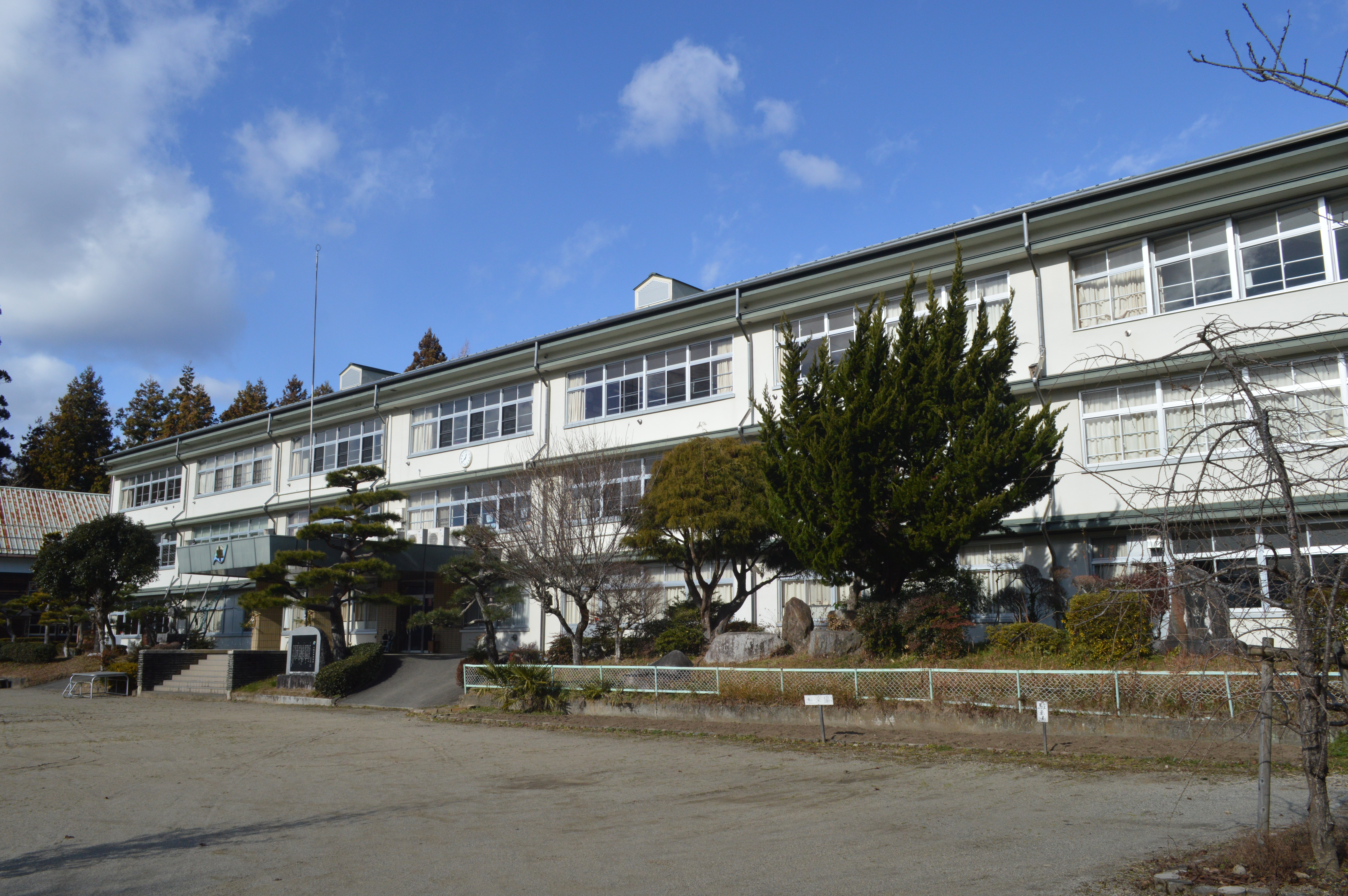 長野県下伊那郡の天龍村立天龍小学校。